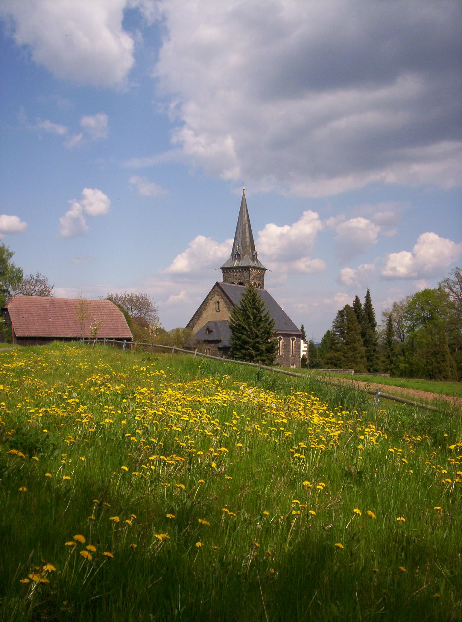 St.-Barbara-Kirche in Eschdorf in der Dresdner Ortschaft Schönfeld-Weißig